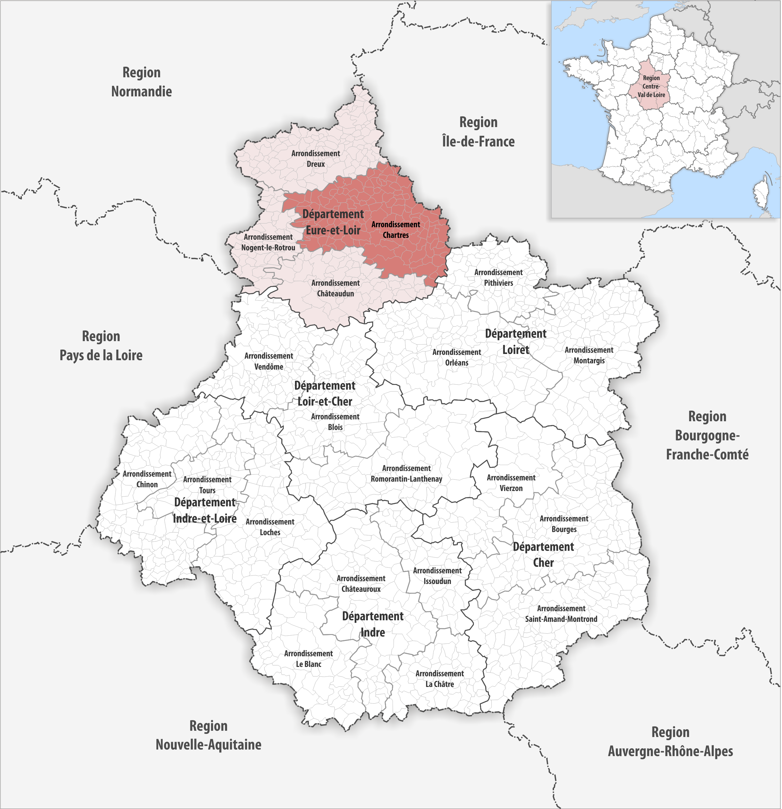 Lage des Arrondissements Chartres